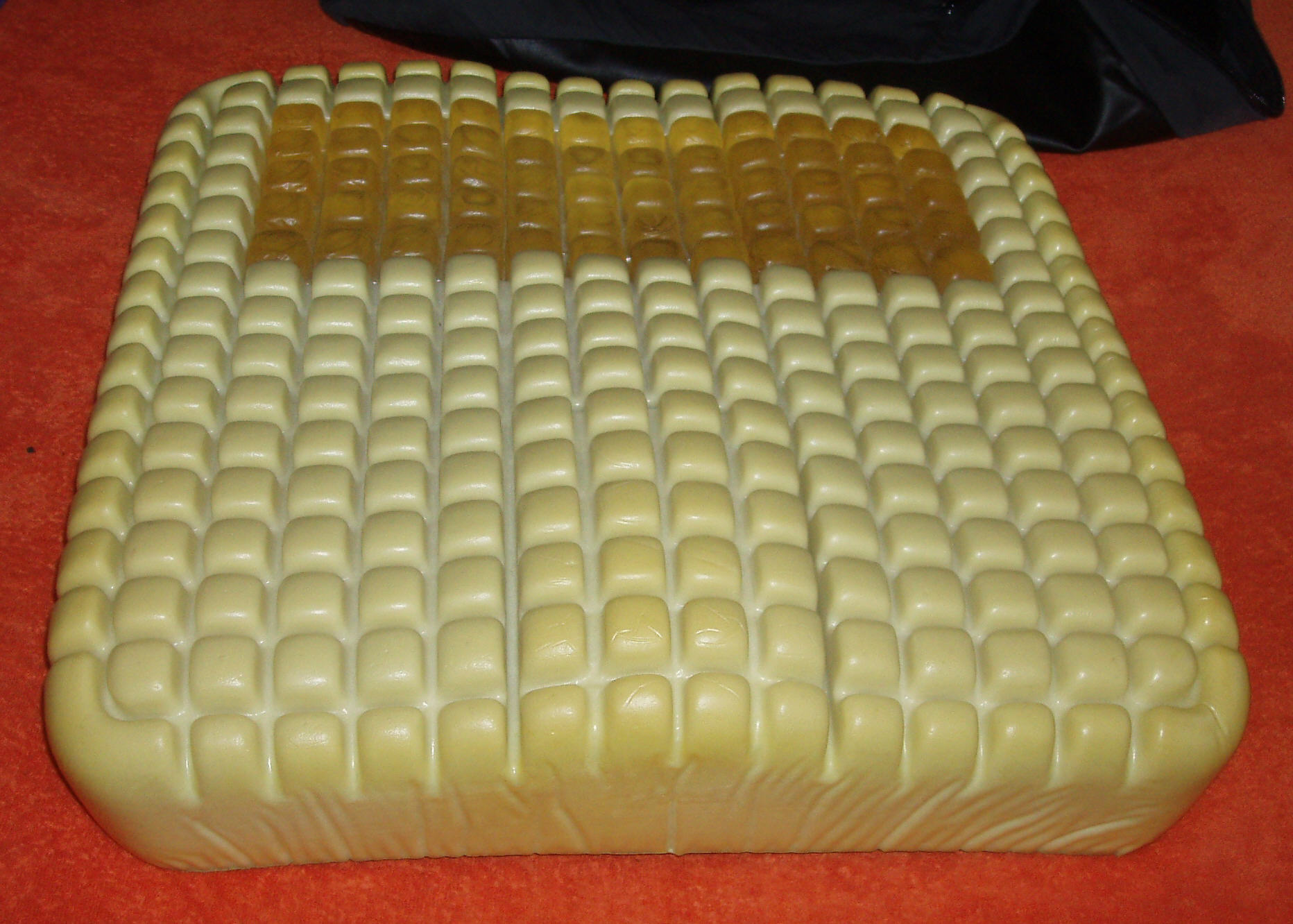 Antidekubituskissen von vorn gesehen, Bezug abgenommen